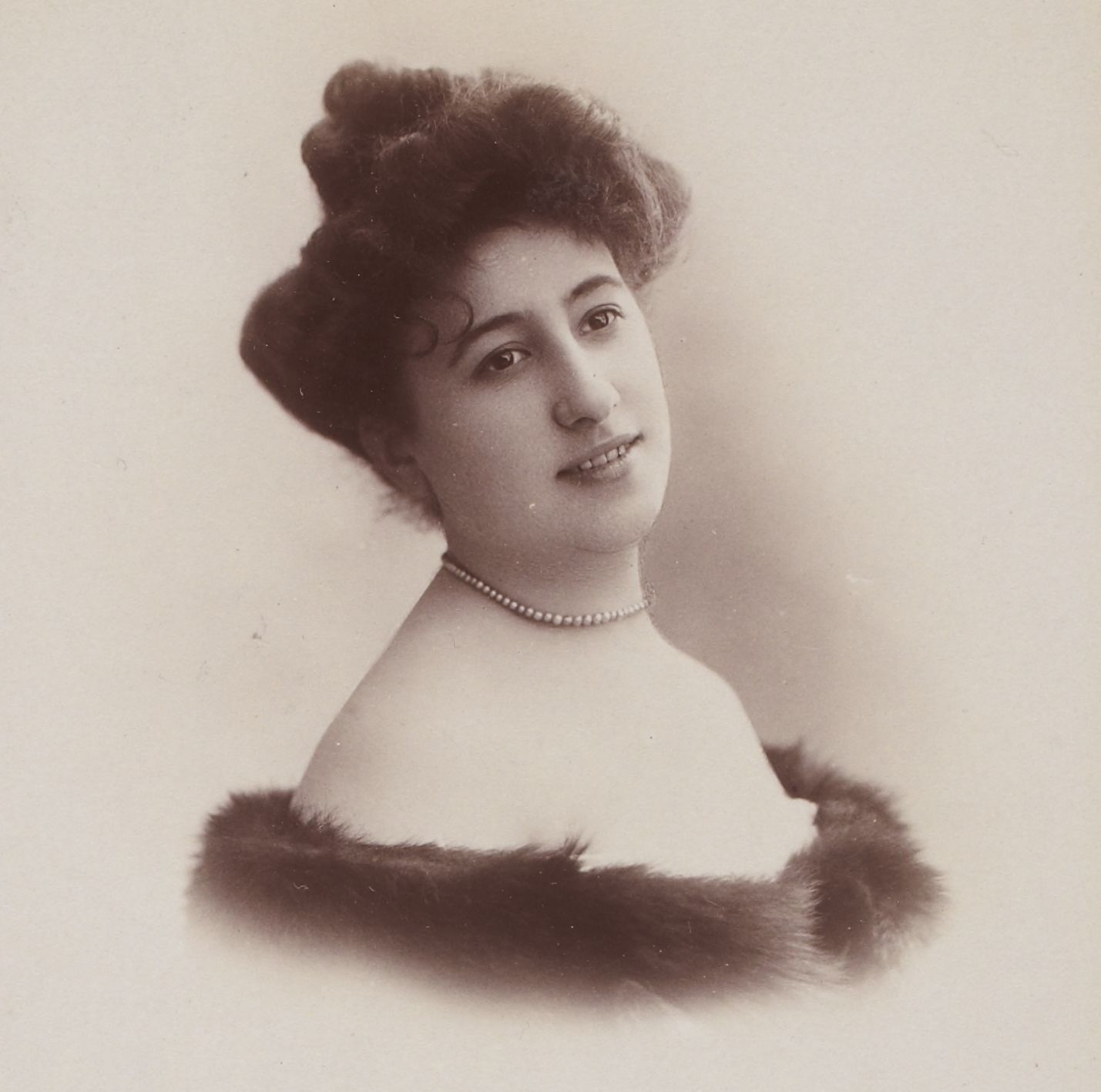 Album Reutlinger de portraits divers, vol. 28 : [photographie positive] : Marie Panthés.